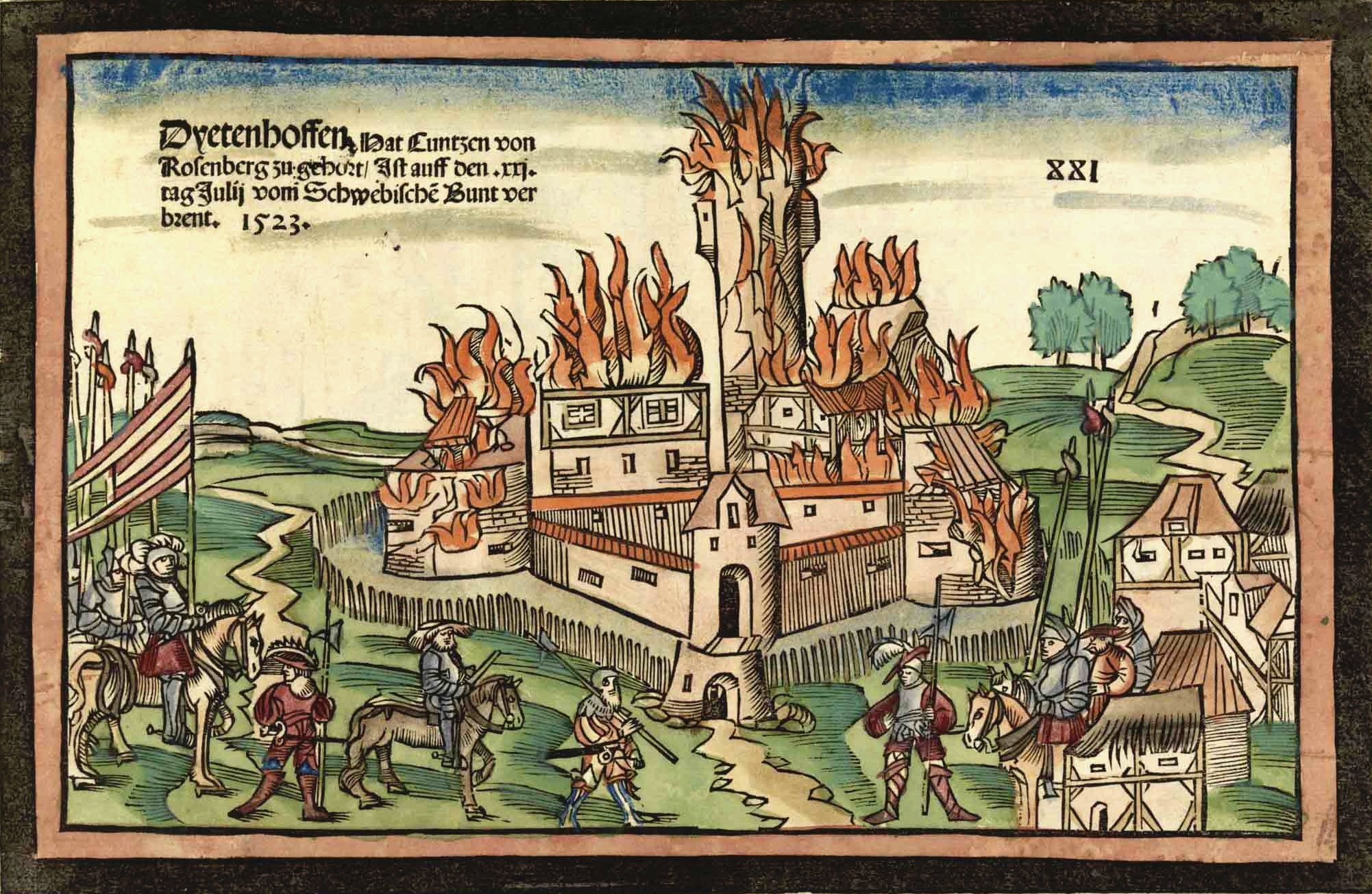 Holzschnitt des Hans Wandereisen: Zerstörung der Burg Dietenhofen durch Truppen des Schwäbischen Bundes.